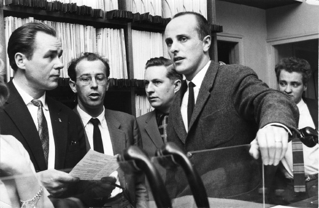 Georg Ots jakamassa nimikirjoituksia Aleksanterinkadun Musiikki Fazerin toisen kerroksen "levyaulassa" vuonna 1958. Vasemmalta Georg Ots, Johan "Mosse" Vikstedt, Ossi Runne, Jaakko Borg ja Osmo Ruuskanen.